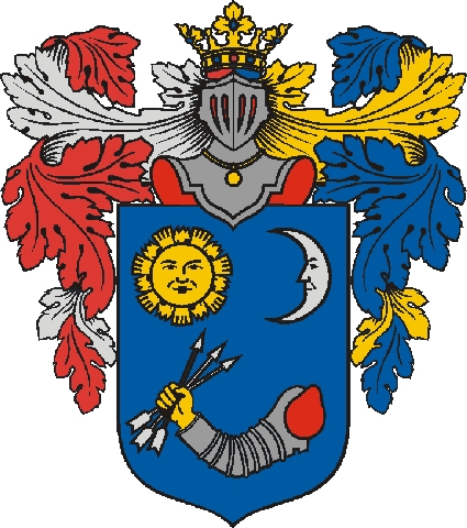 Herb miasta Hódmezővásárhely